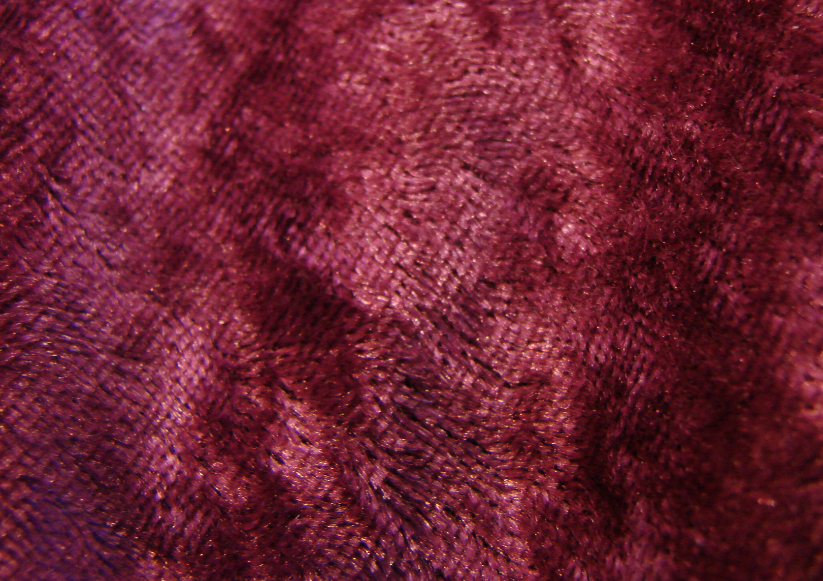 Purple velours